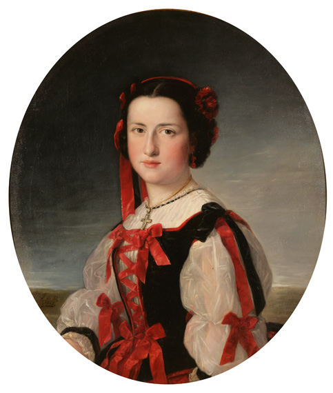 Pintura al óleo. La Infanta Luisa Fernanda de Borbón.